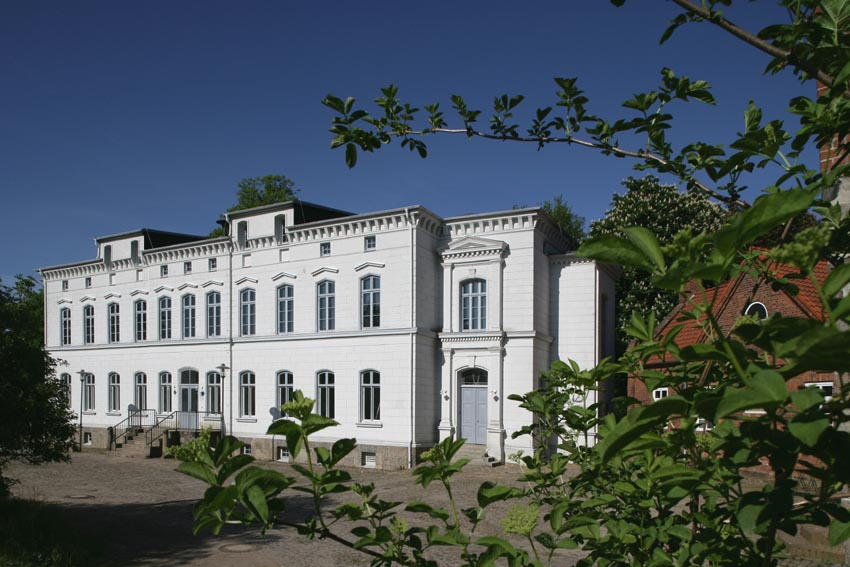 flour art museum, Wittenburg